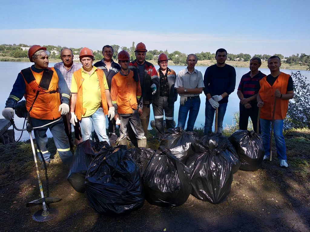 Акція "Чисті береги"